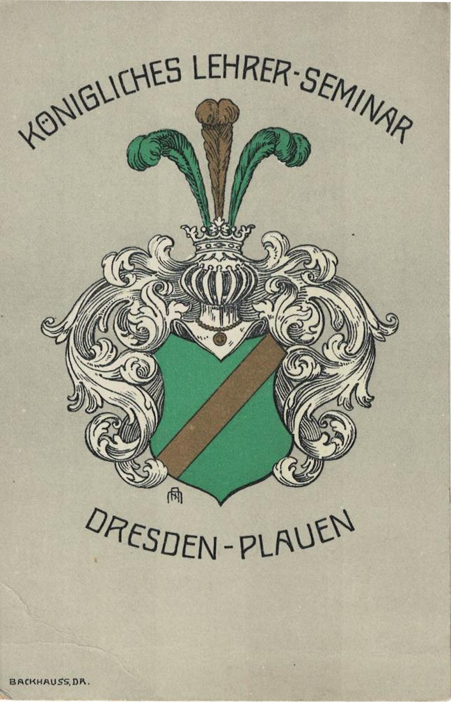 Wappen, Königliches Lehrer-Seminar Dresden Plauen, Backhauss, Dr.